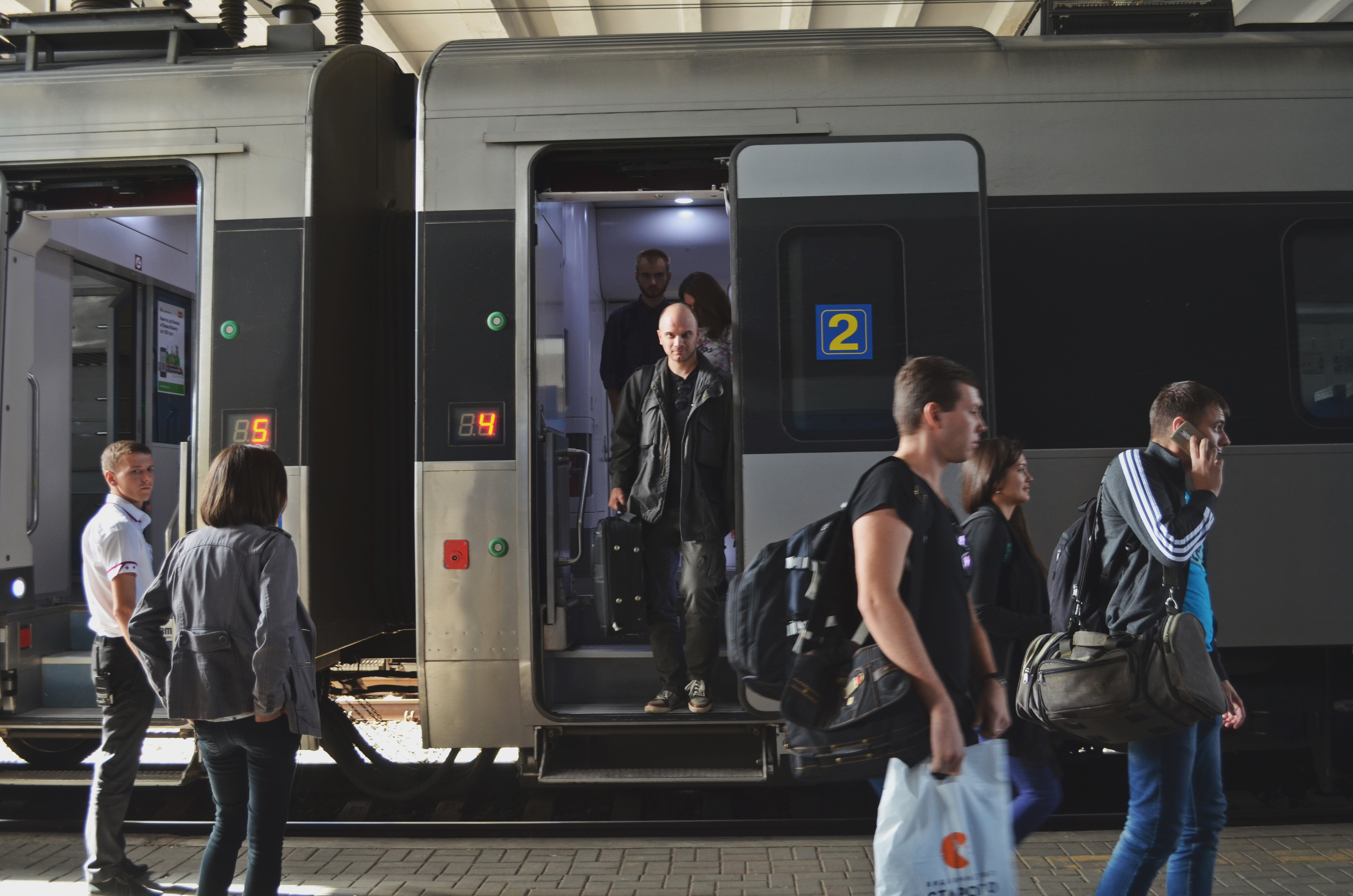 Srdić u Kijevu, 2016